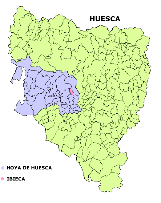 Mapa del municipio de Ibieca Creado el 07.12.2005 por Dionisio en base a Image:Huesca municipalities.png